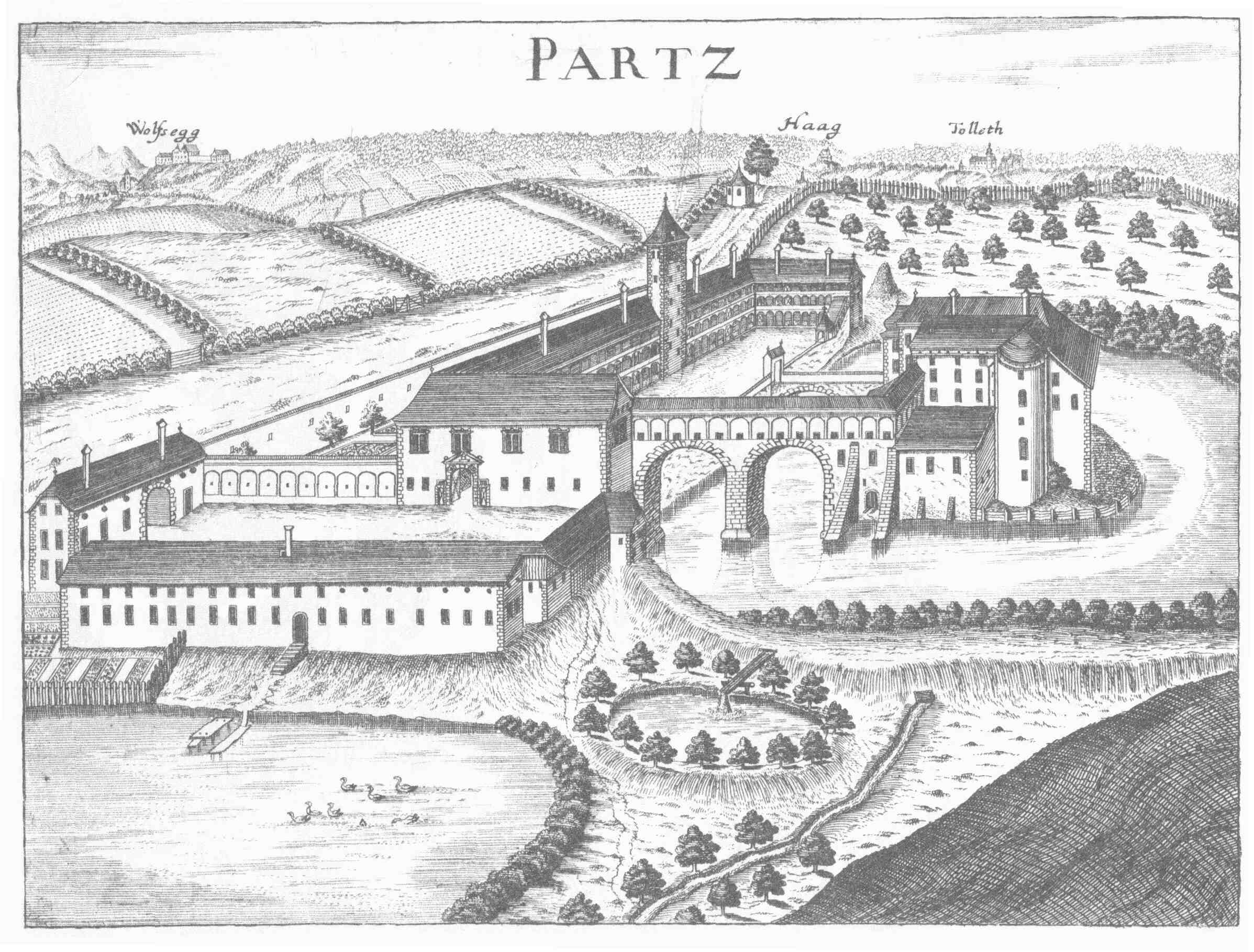 Schloss Parz nach einem Stich von G. M. Vischer von 1676